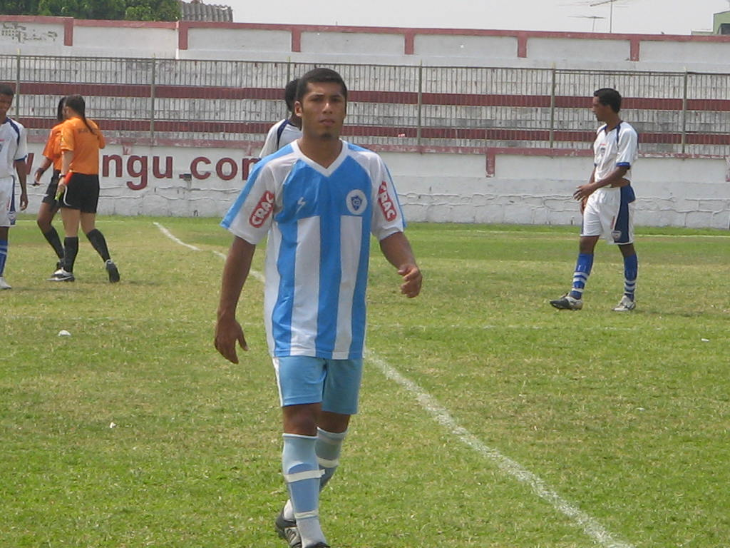 Thiago, jogador do Canto do Rio, em 2007. Foto de Paulo Roberto Rodrigues.